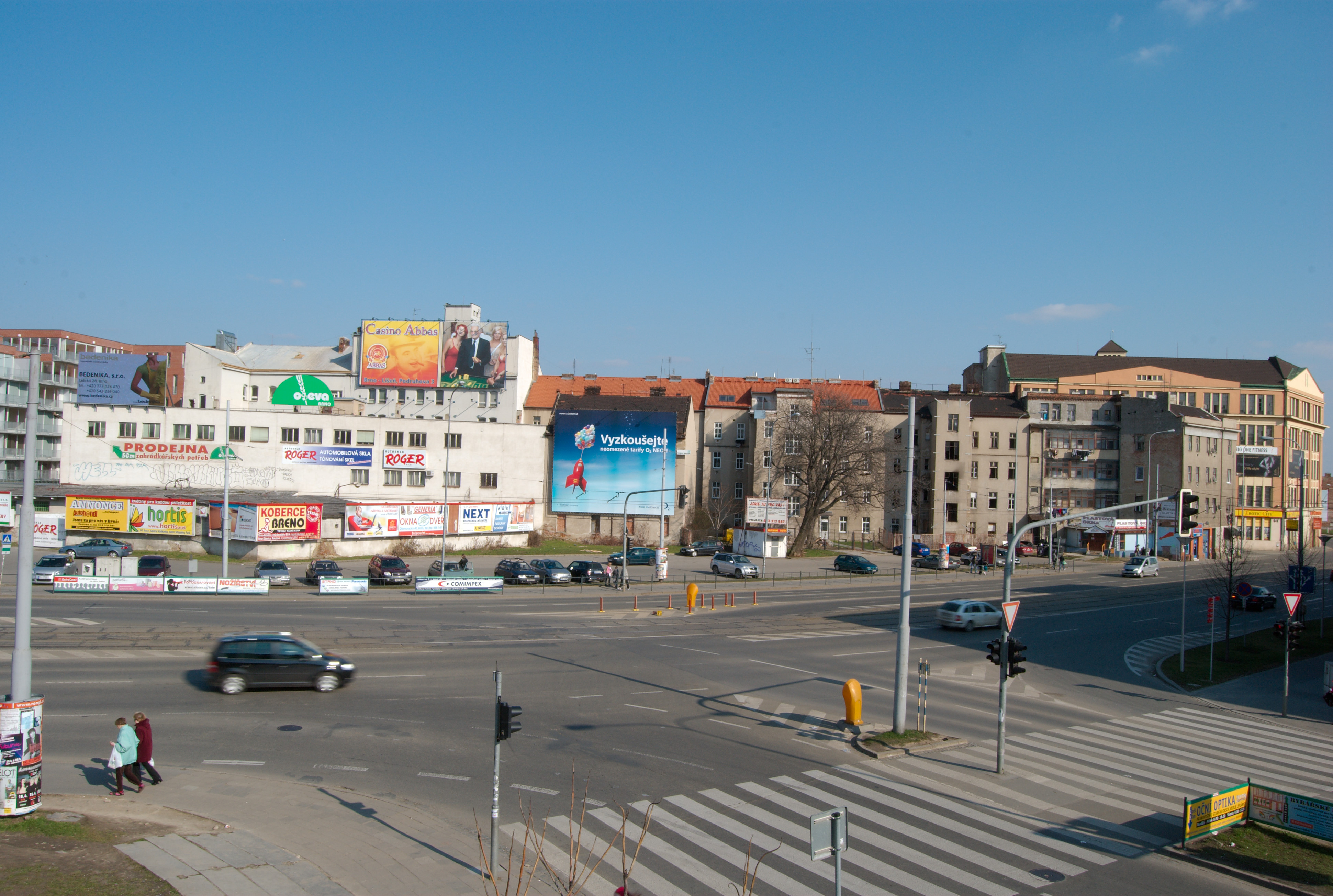 Brno-Trnitá - pohled z terasy obchodního domu Tesco na zástavbu při východní straně ulice Dornych.